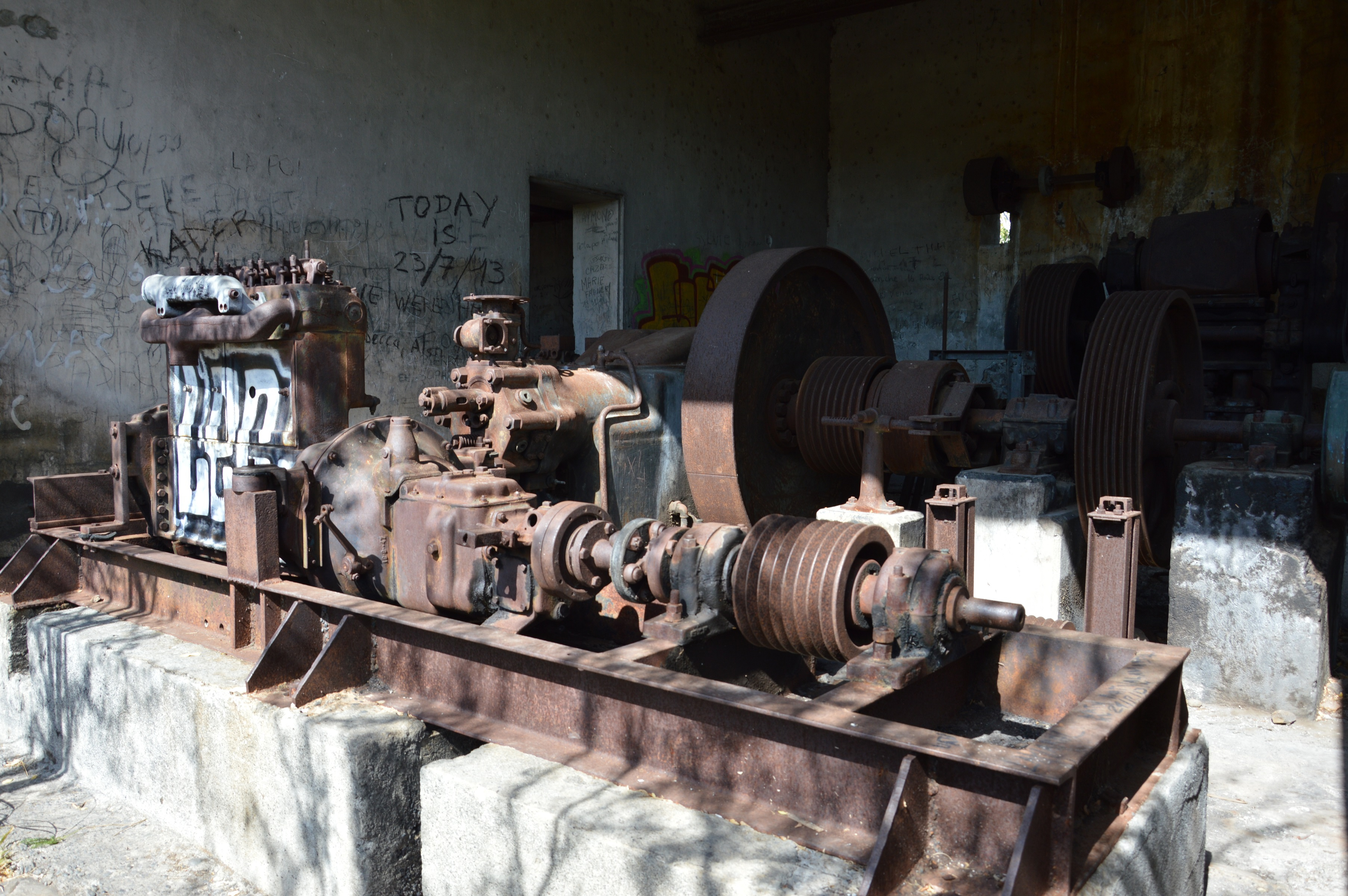 Mécanisme